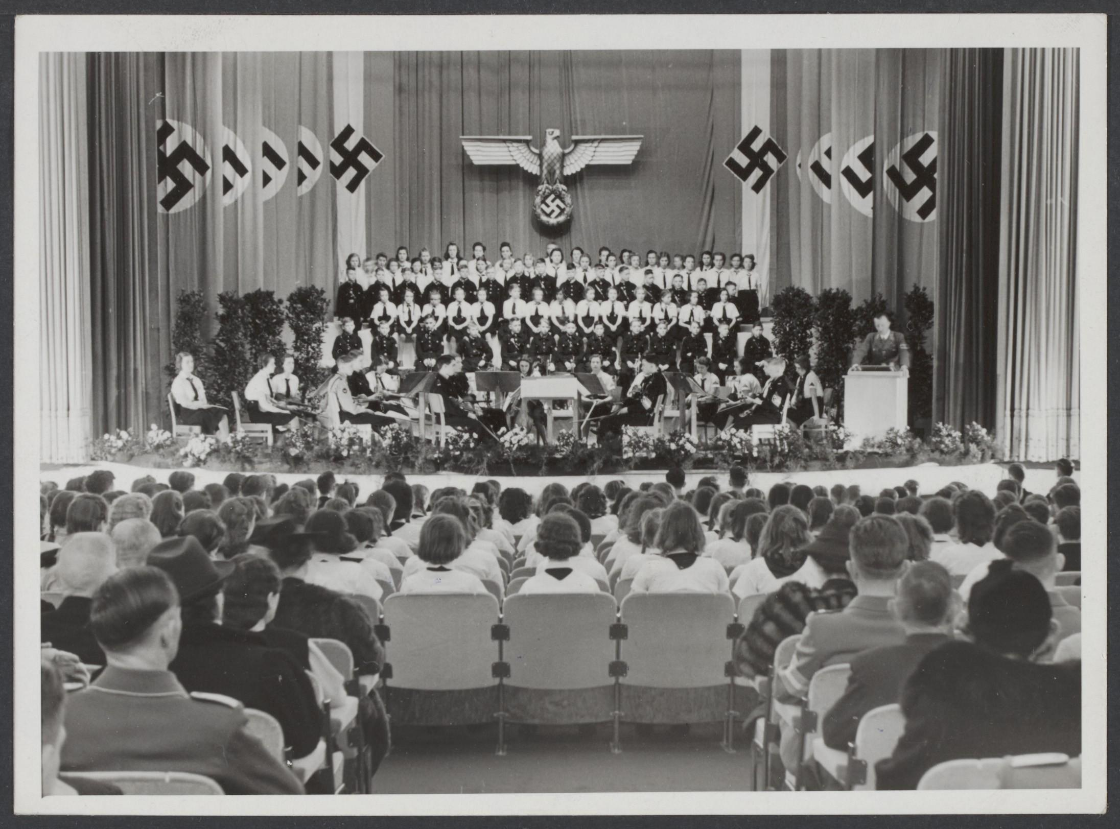 In de Stadsschouwburg te Utrecht werden de jongens en meisjes van het jongvolk, die de leeftijd van 14 jaar hebben bereikt op plechtige wijze in de Hitlerjugend. en Bund Deutscher Mädel ingewijd, 22 maart 1942